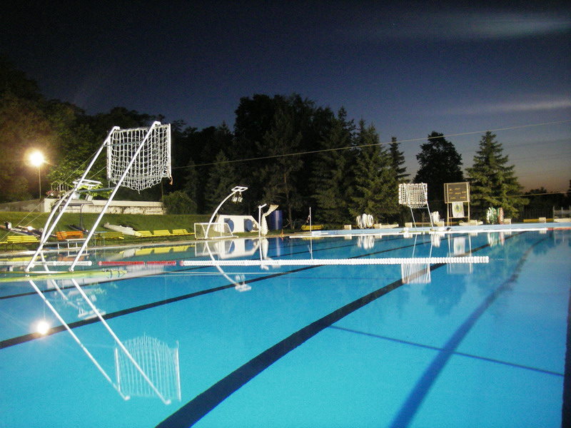 Kajakpólós játéktér éjszaka, Tatabánya